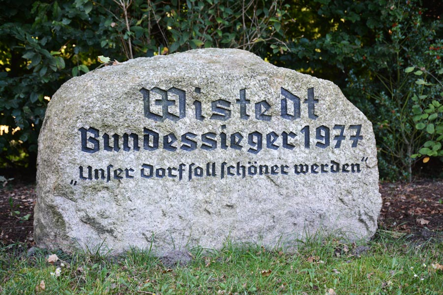 Wistedt Bundessieger